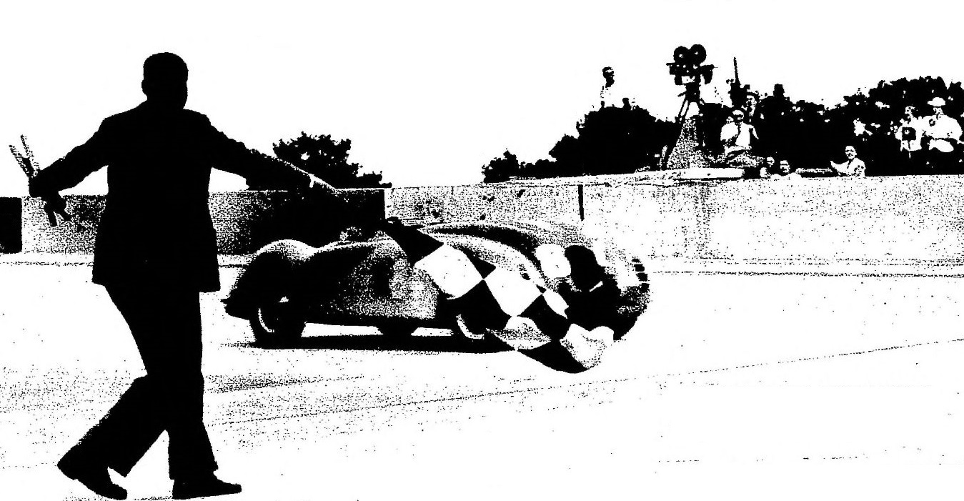 Jean-Pierre Wimille remporte le GP de l'ACF 1936.